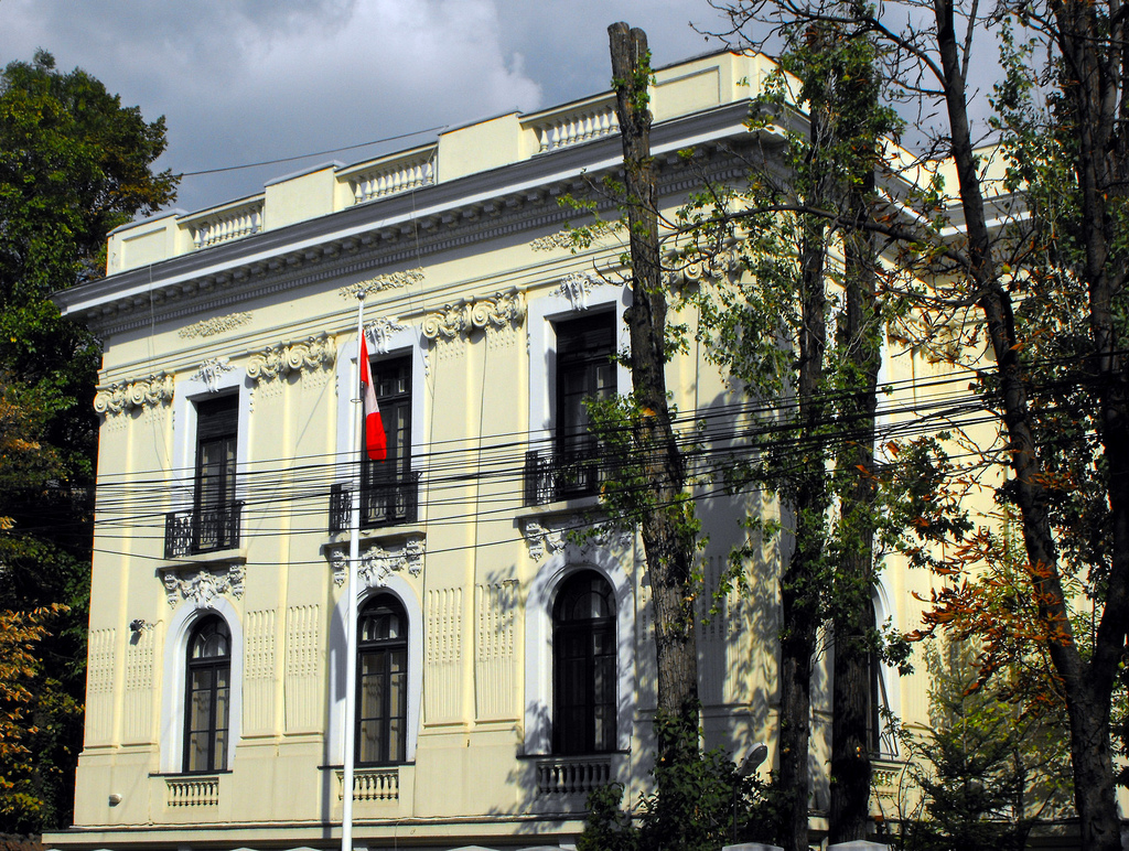 Polona 2